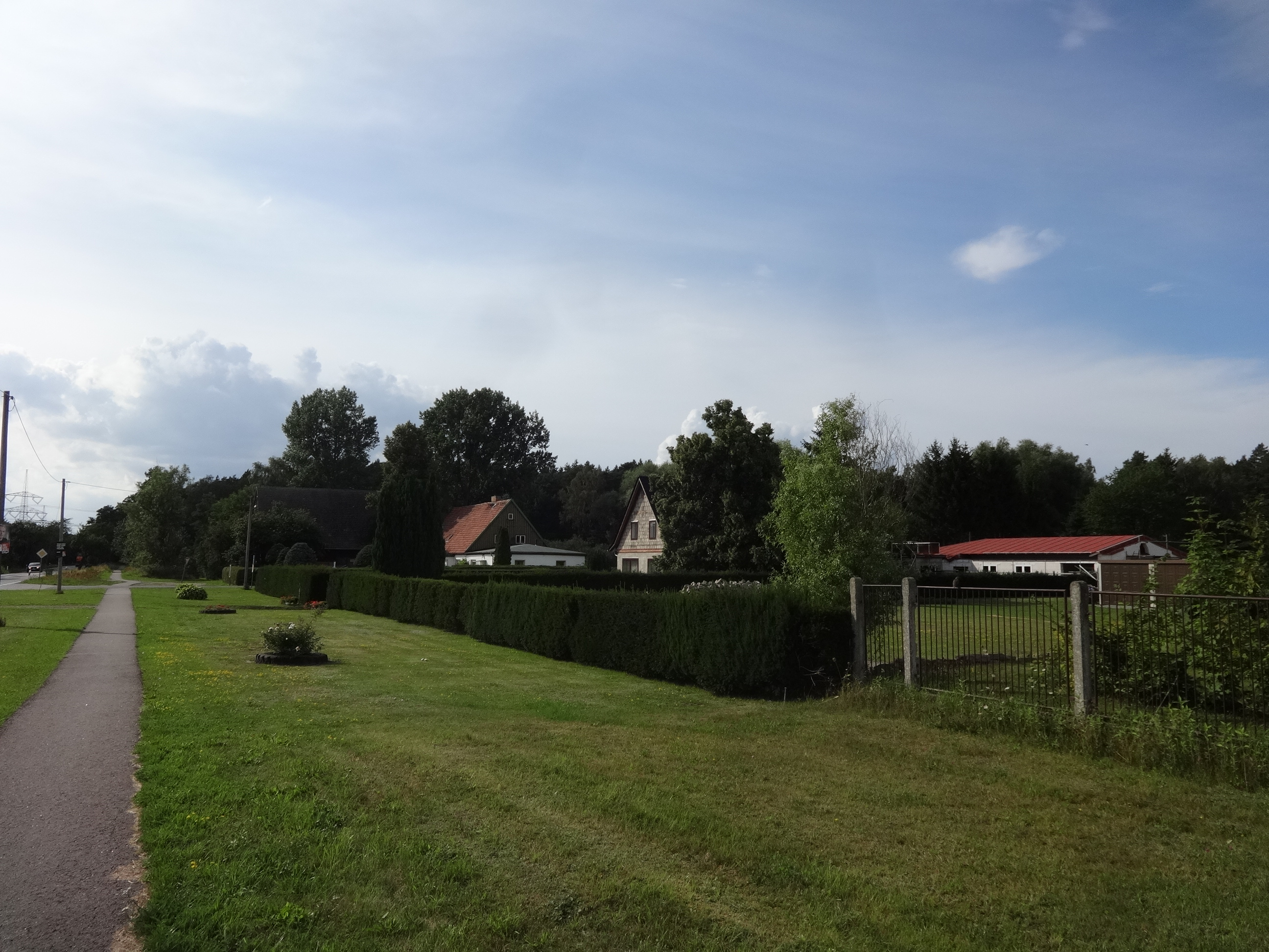 Stevelin, ein Ortsteil der Gemeinde Wusterhusen in Mecklenburg-Vorpommern